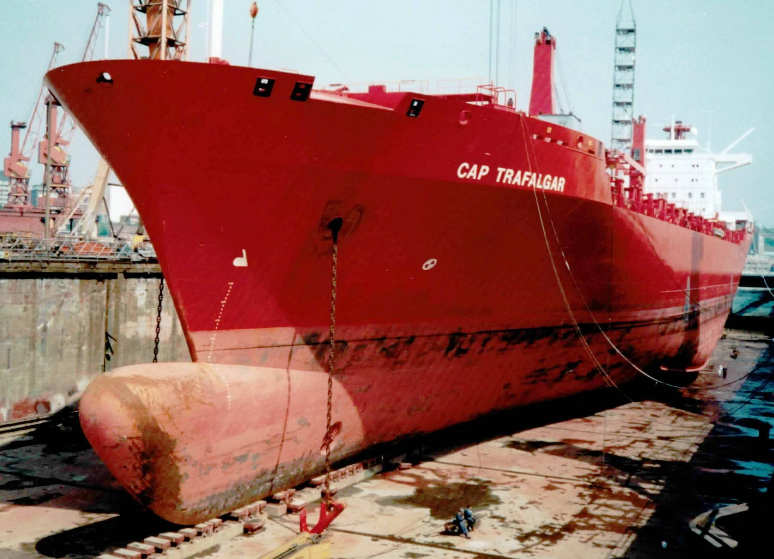 Cap Trafalgar